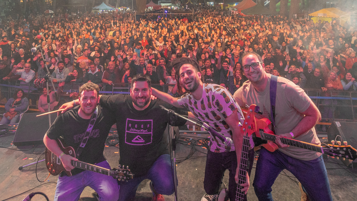 En vivo en la Fiesta Nacional del Sol y la Familia, año 2019.